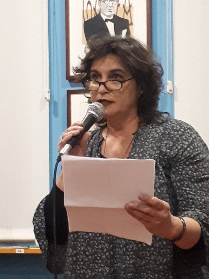 Clara do Roxo lee un relato propio, con motivo del cierre de la librería Andel. Vigo 2019